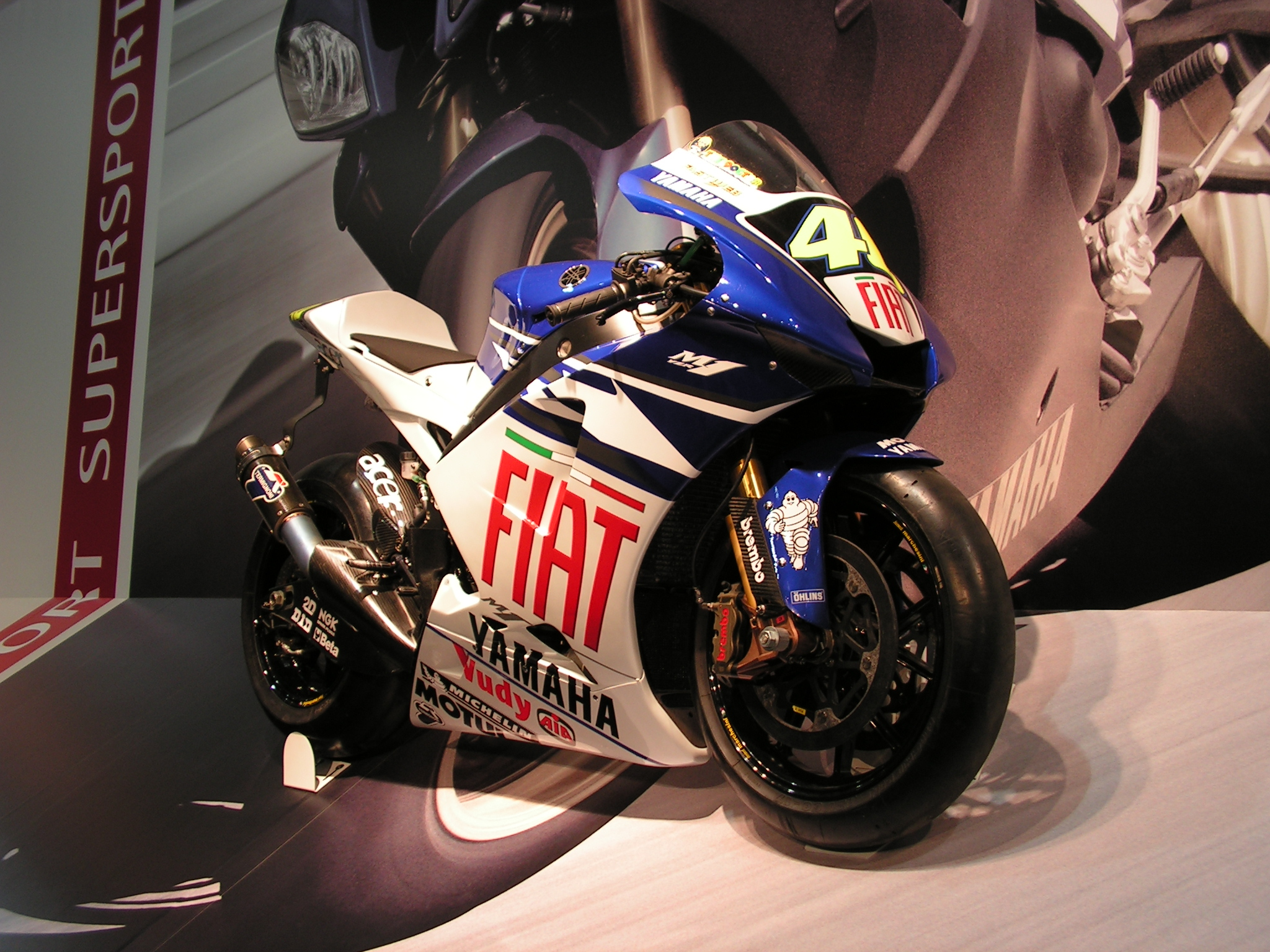 Yamaha YZR-M1 2007 - EICMA 2007, Milan (Italy)